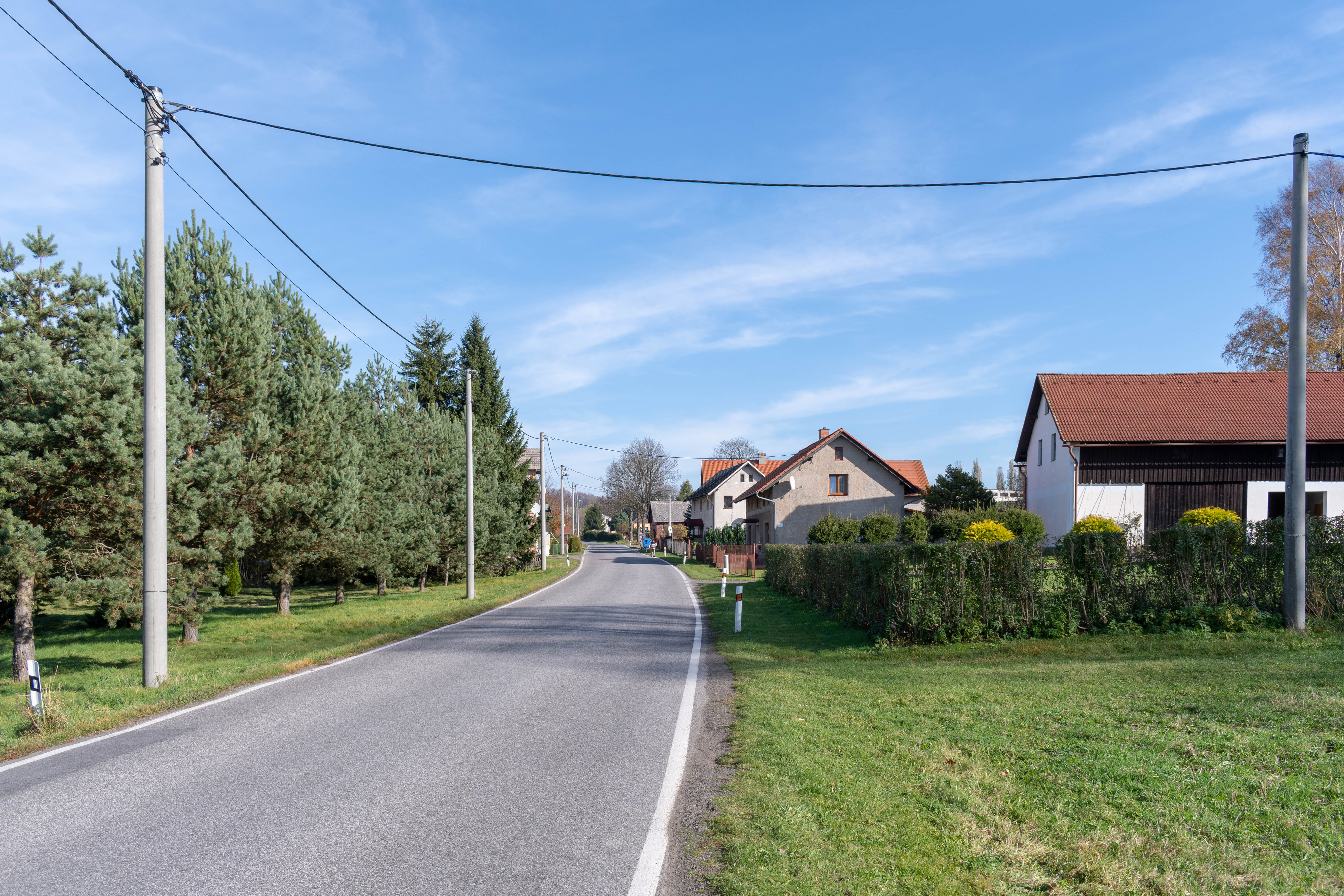 Celkový pohled na obec Bohdašín